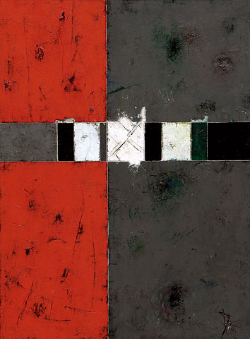 Leinwandarbeit